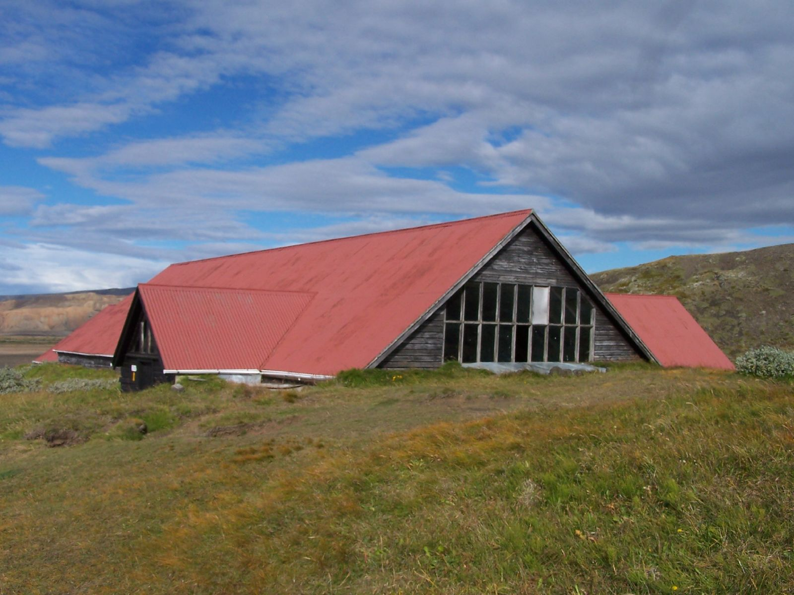 Stöng, from outside